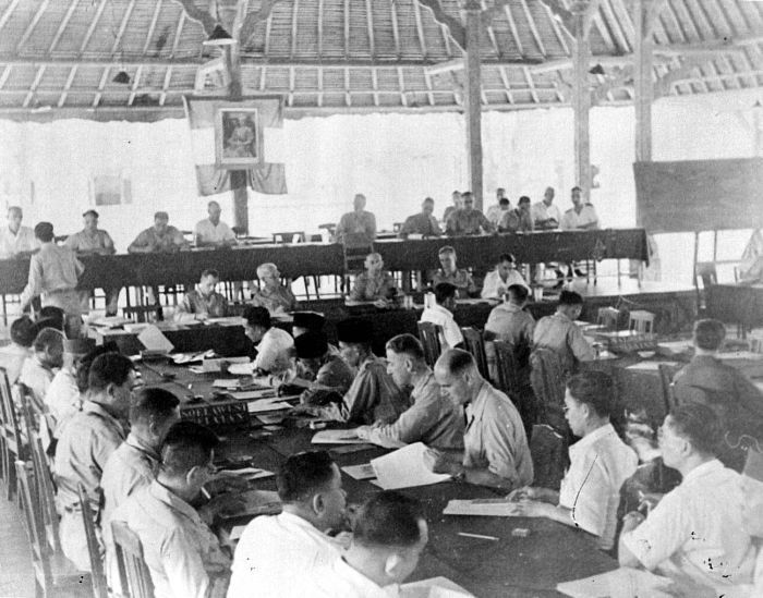 Repronegatief. In december 1946 werd ter realisering van het overleg te Malino de conferentie te Den Pasar belegd. Hieruit vloeide voort de stichting van de staat Oost-Indonesië.